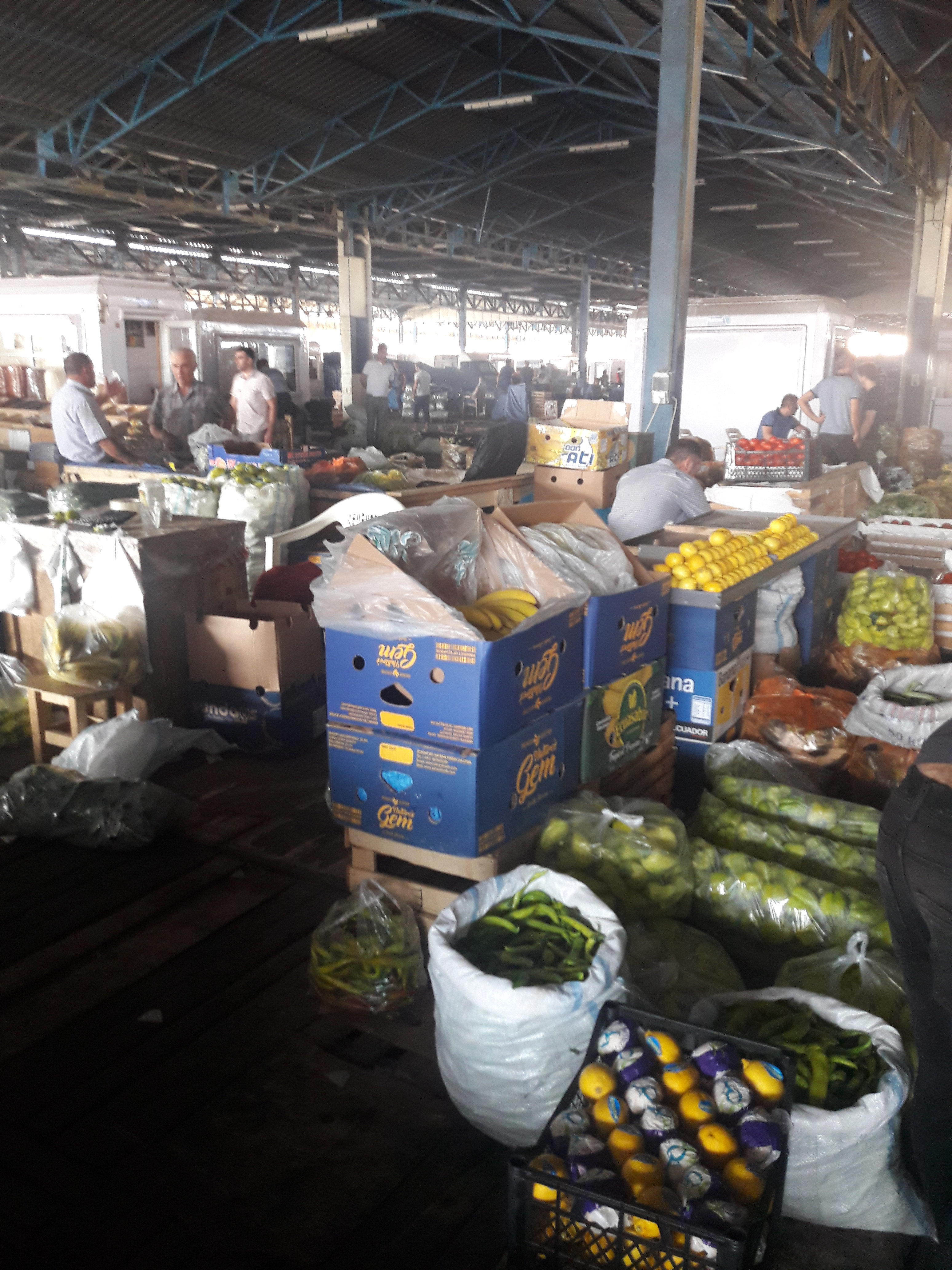 Meyvəli bazarı